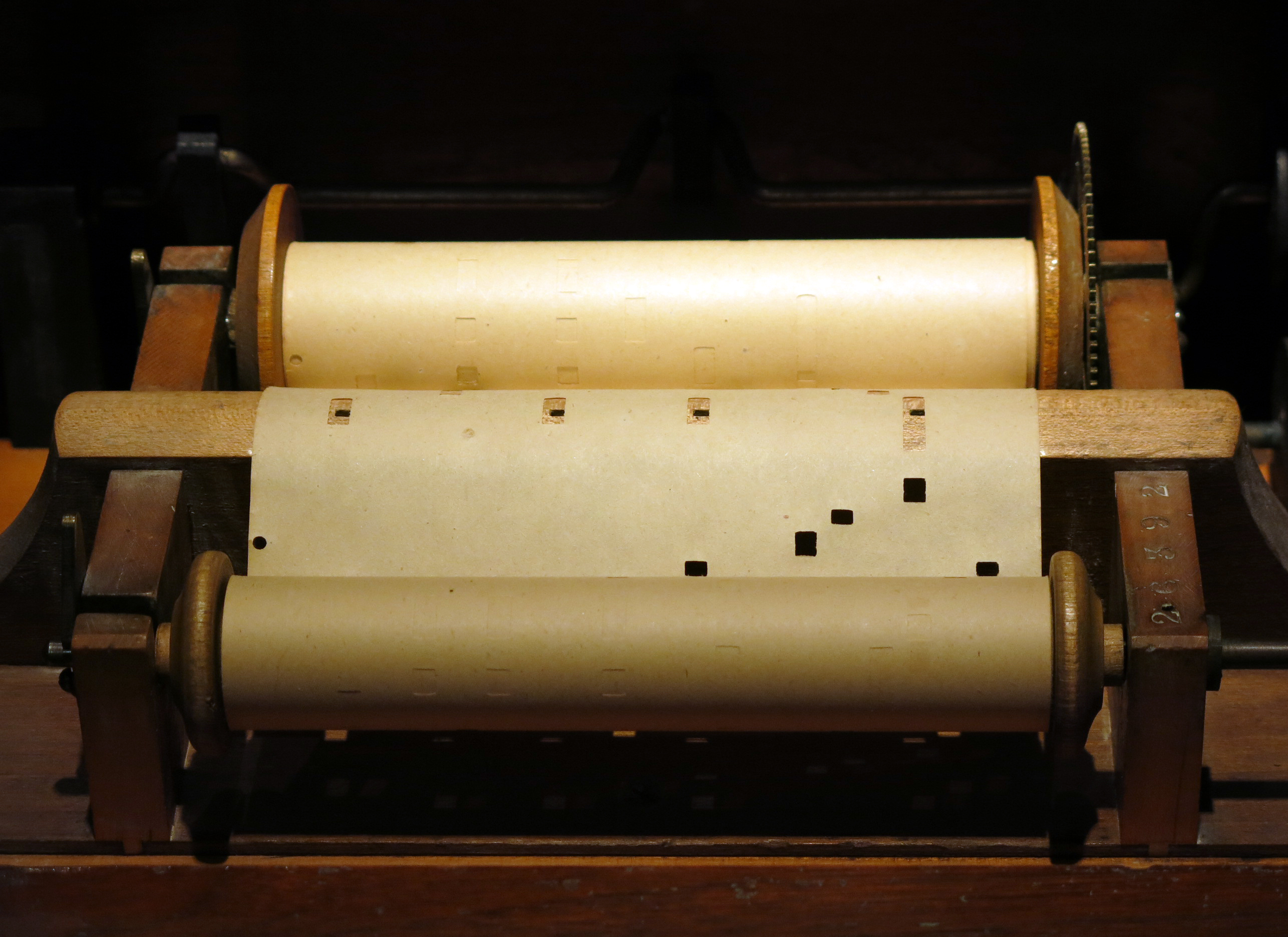 Orgue de maneta. 1880 - 1925. Museu de la Música de Barcelona. (MDMB 546)